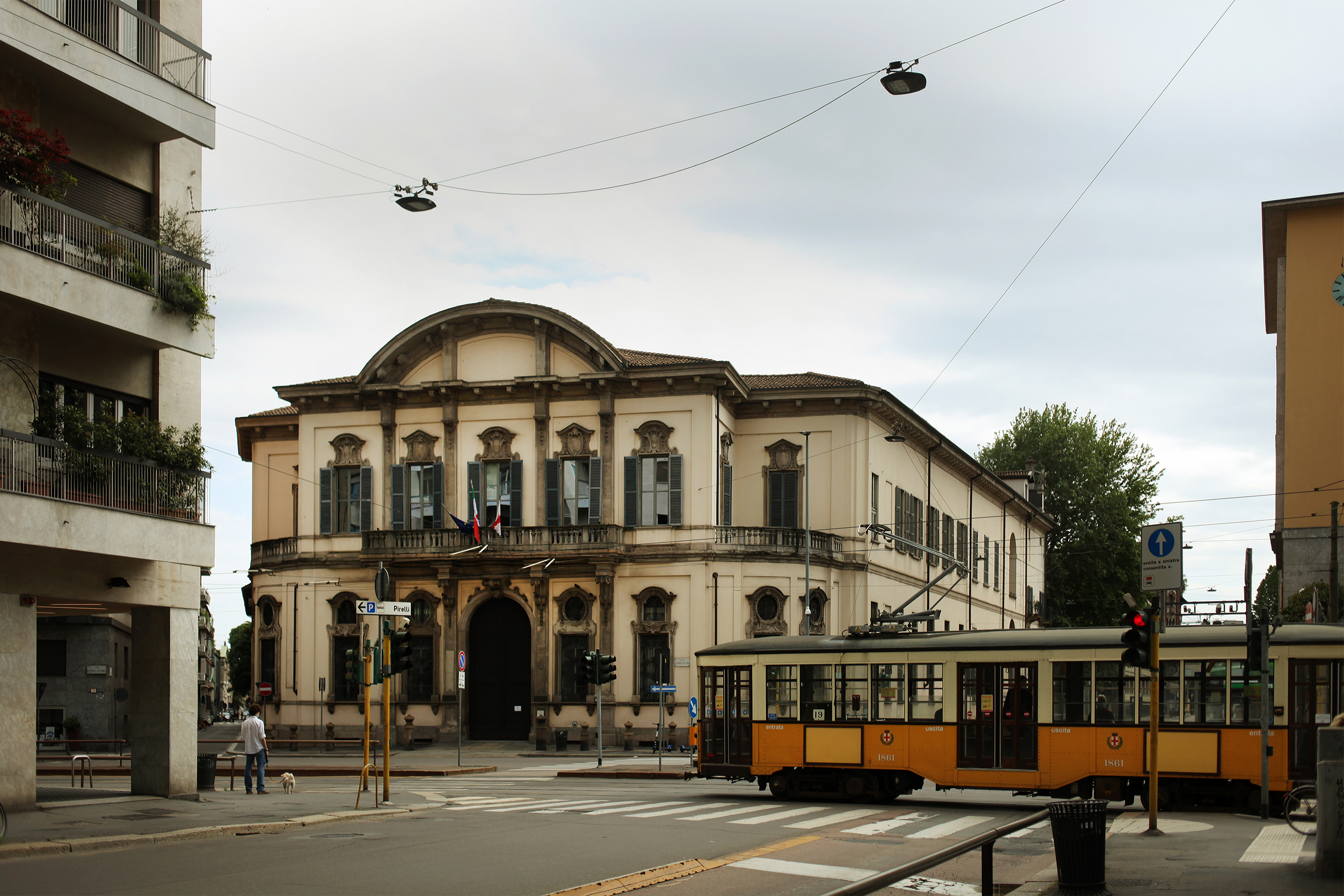 Palazzo Sormani a Milano, veduta con tram Tram ATM serie 1500